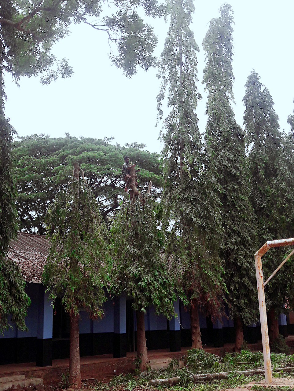 അരണമരം ശാസ്ത്രീയനാമം: Polyalthia longifolia കുടുംബം Annonaceae.